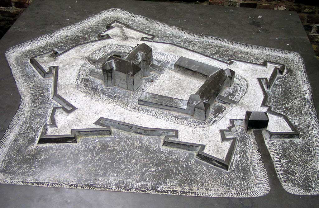 Schloss Rheydt, Modell (Original text: Modell von Schloss Rheydt um 1600.Die Skulptur wurde hergestellt von Giuseppe Donnaloia. Das foto wurde aufgenommen am 3. Oktober 2004.) Andere Versionen